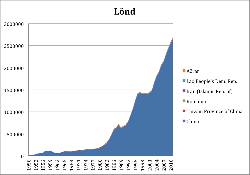 Lönd þar sem að Eðalkarpi er veiddur/í fiskeldi